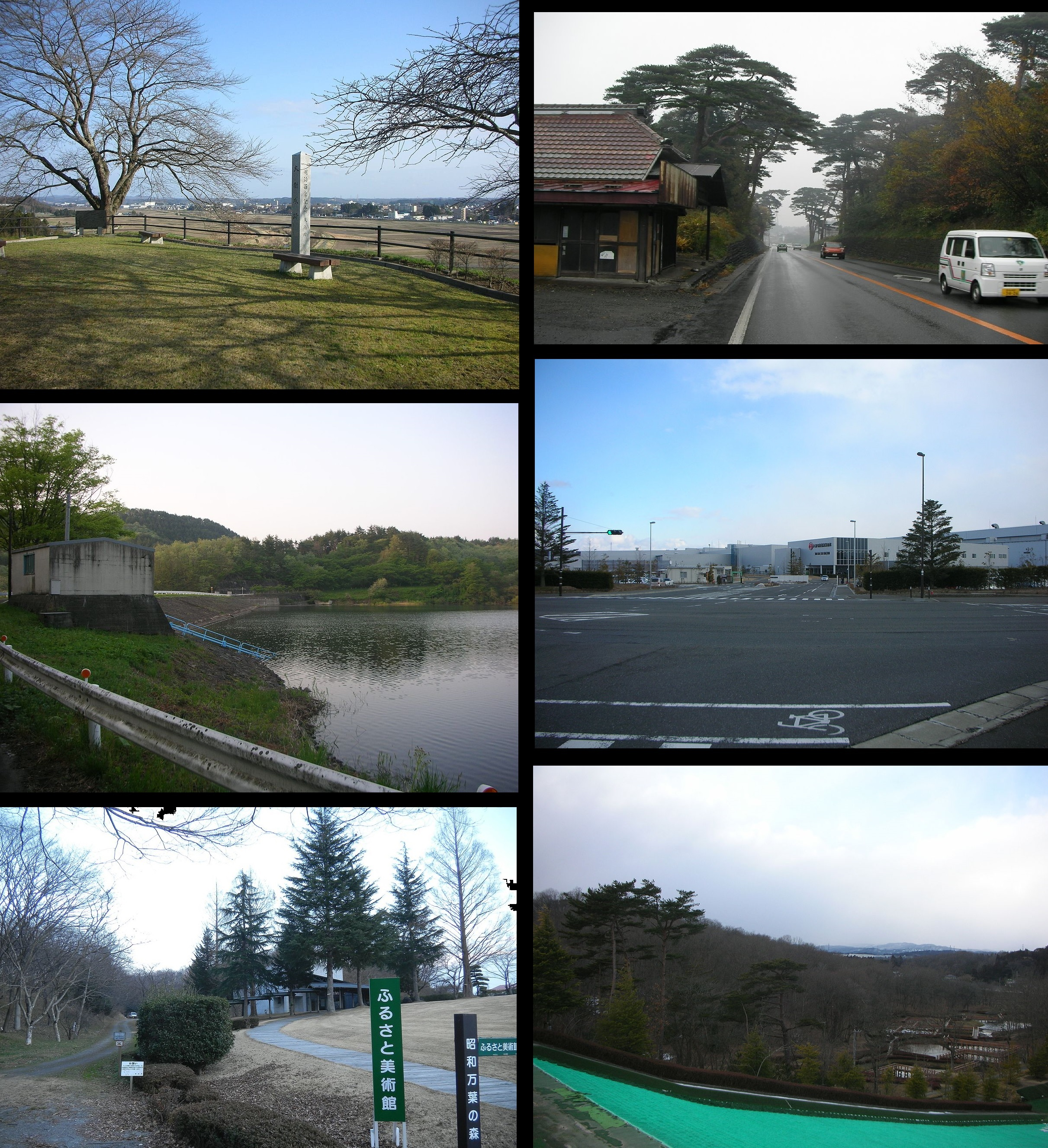 宮城県黒川郡大衡村